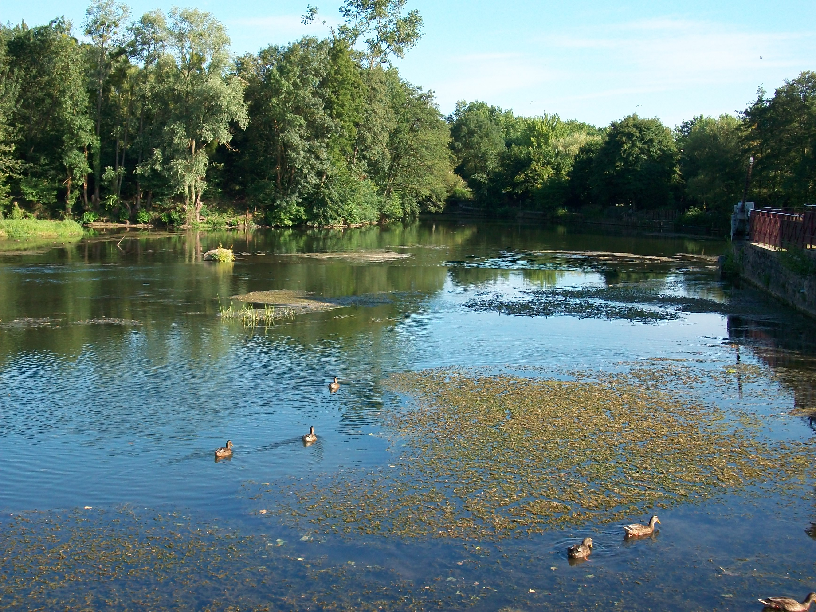 Entrée de l'arche de la nature côté des Sablons depuis l'ancienne usine hydraulique et le musée de l'eau.